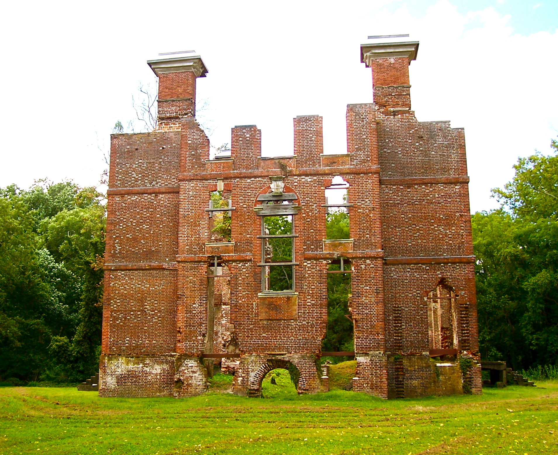 Rosewell Ruins, Va